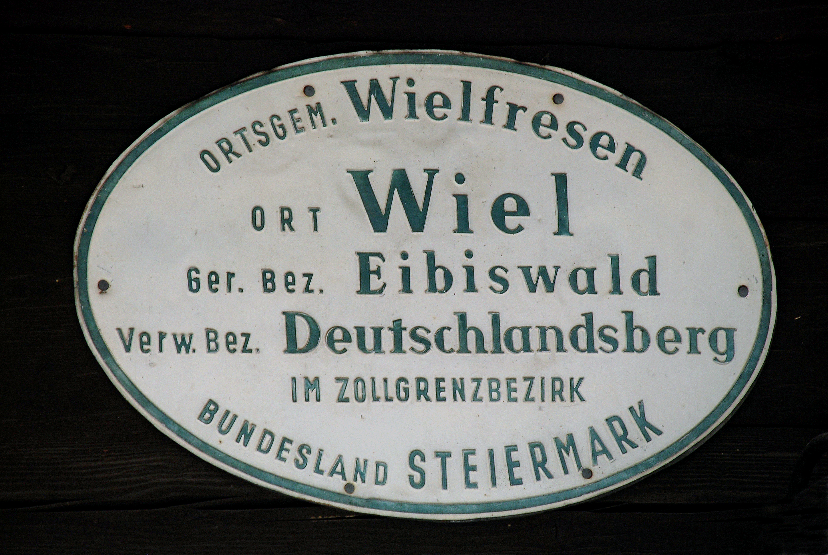 Wielfresen, Steiermark, Österreich: altes Ortsschild der Gemeinde Wielfresen am Gemeindeamt